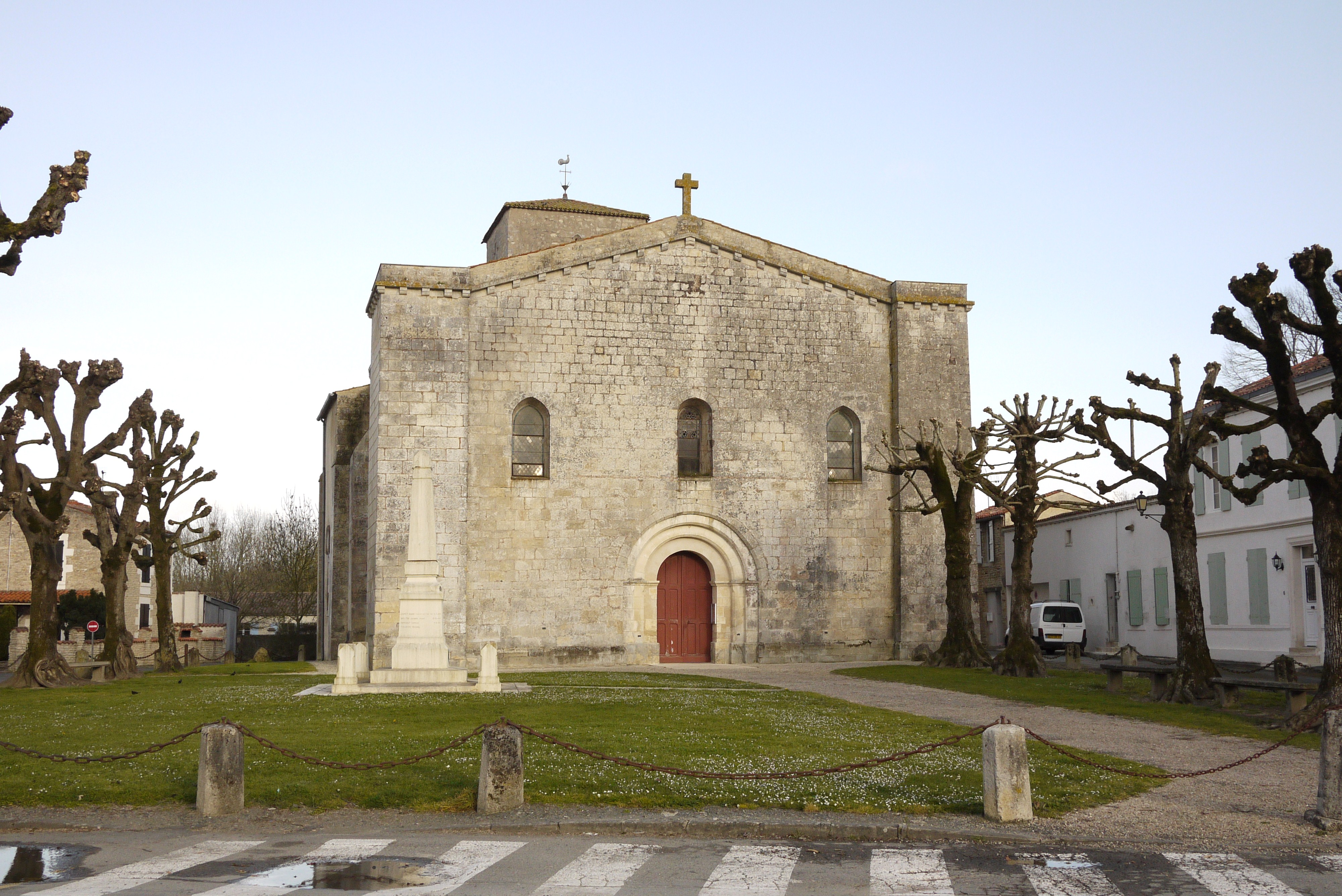 L'église de la Transfiguration et son parvis à Saint-Sauveur-d'Aunis. Dates de construction: 11ème et 12ème siècles. Cette église romane est inscrite comme immeuble au titre des Monuments Historiques depuis 1925 (PA00105231). On peut remarquer que le monument aux morts est situé sur la pelouse du parvis. Saint-Sauveur-d'Aunis, Charente-Maritime, France.